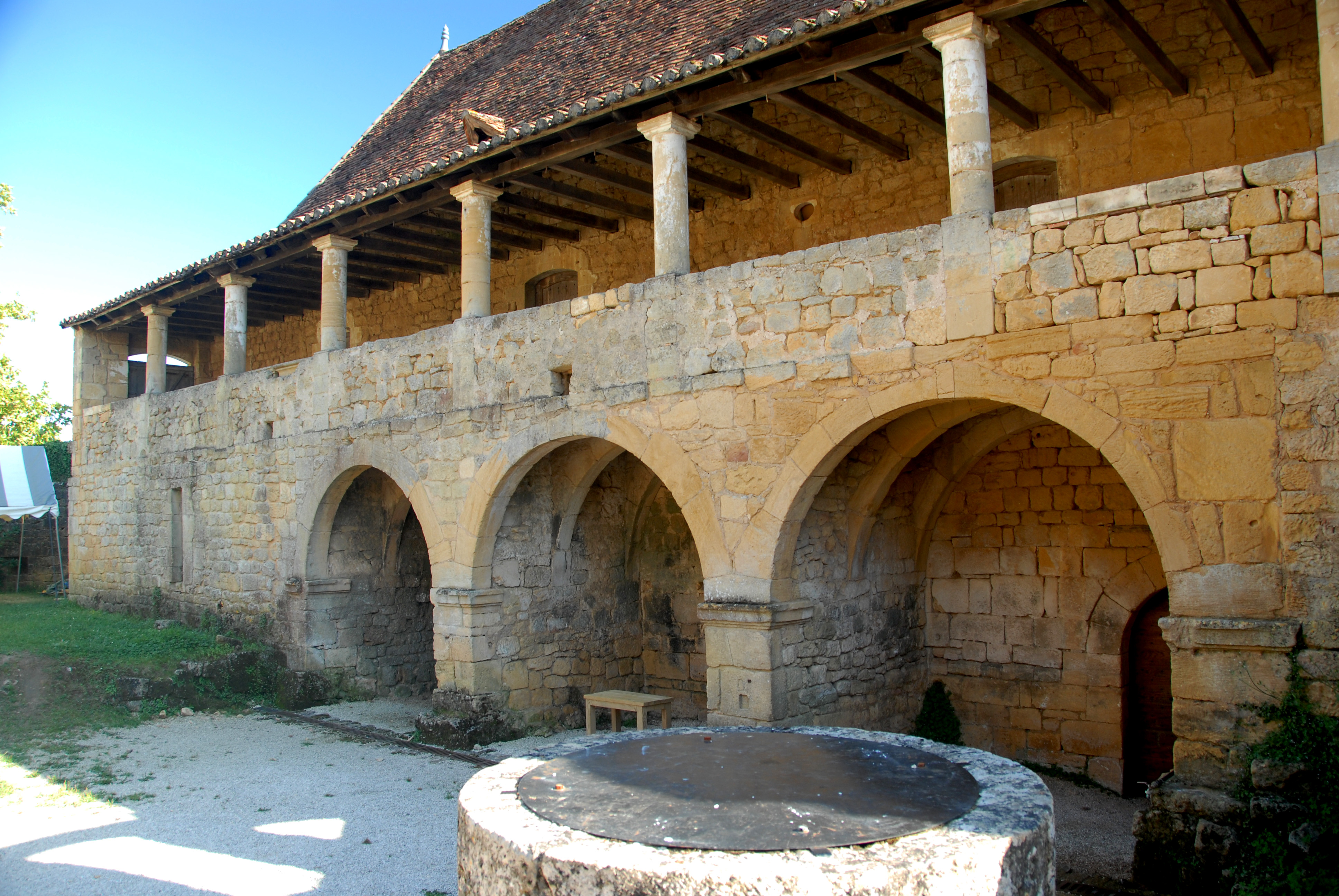 St.-Avit-Sénieur, ehem. Pfarrhaus, Nordgalerien